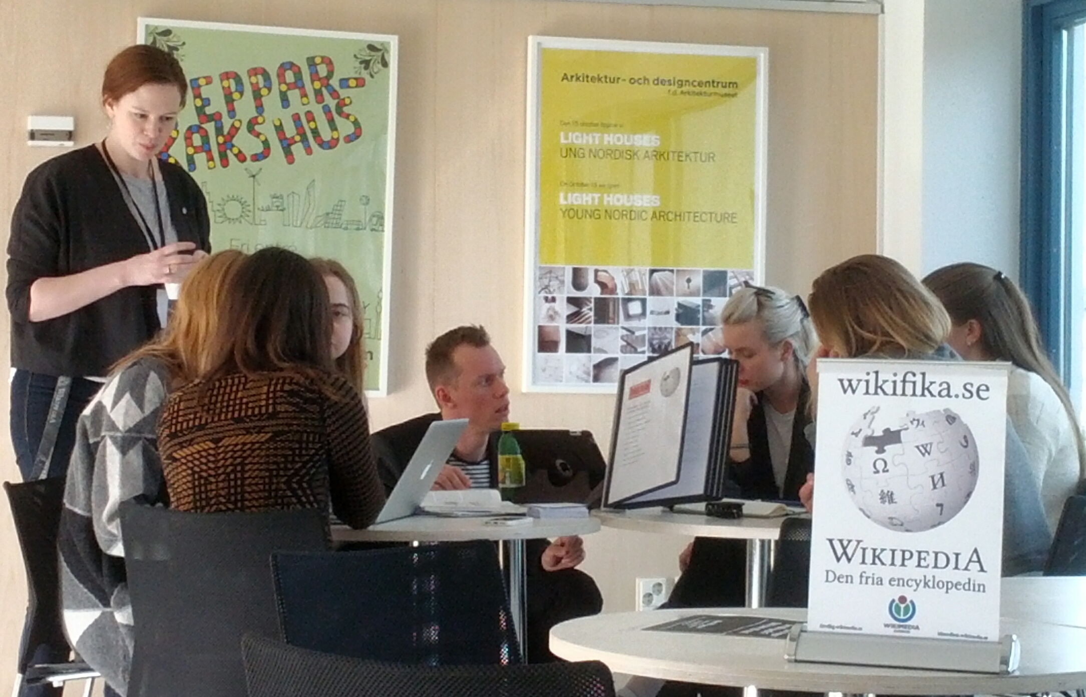 Workshop på träffa Wikipedia